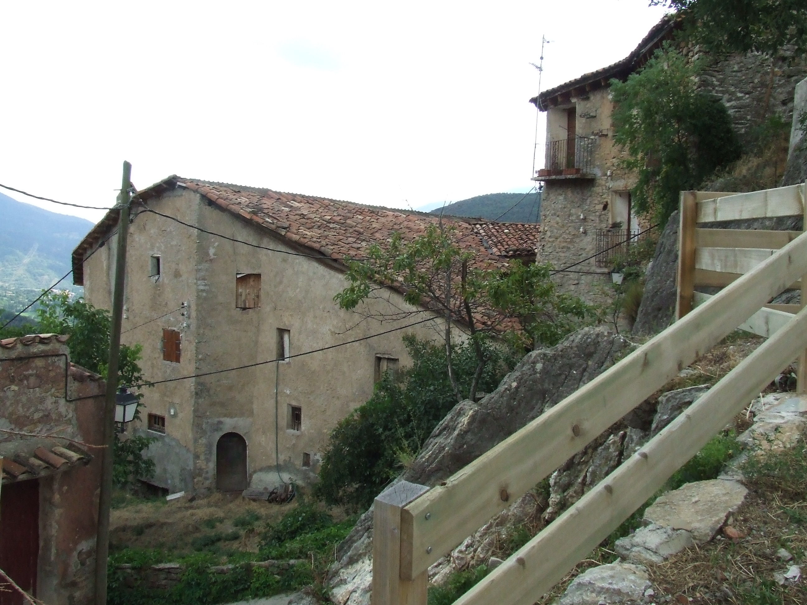 El centre del poble de Beranui (Mont-ros, la Torre de Cabdella, Pallars Jussà)